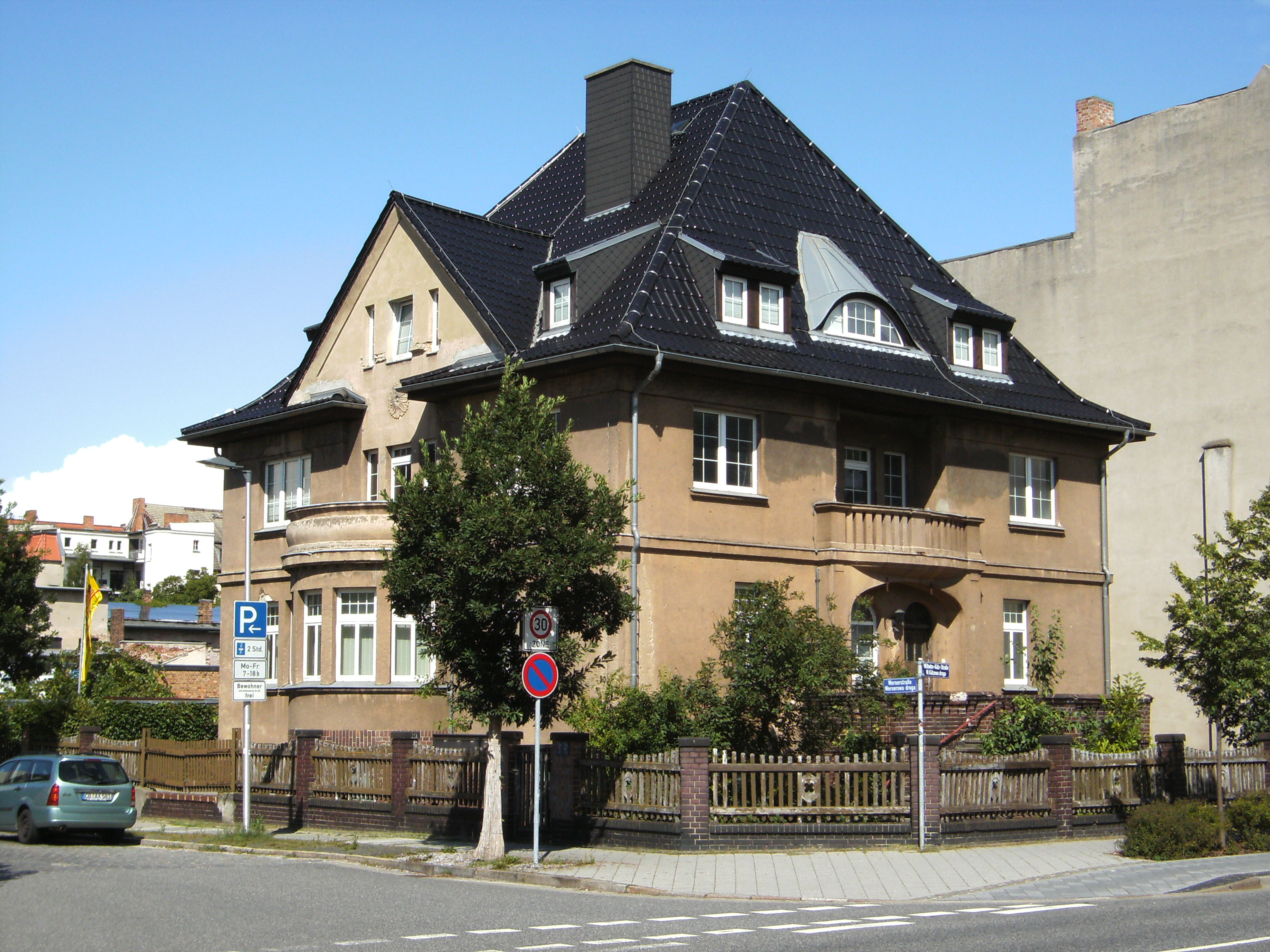 Wernerstr. 30